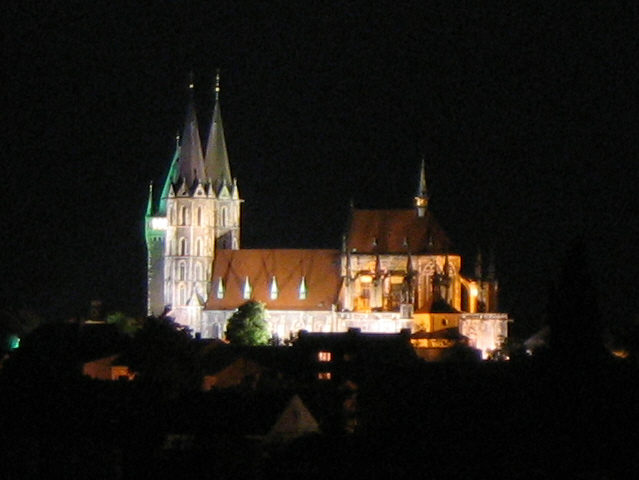 Nasvětlený kolínský chrám sv. Bartoloměje z 2. poloviny 13. století. Vysoký chór vpravo je dílem Petra Parléře (konec 14. století), úplně vlevo je zase zvonice z 15. století, jejíž ochoz je přístupný veřejnosti.